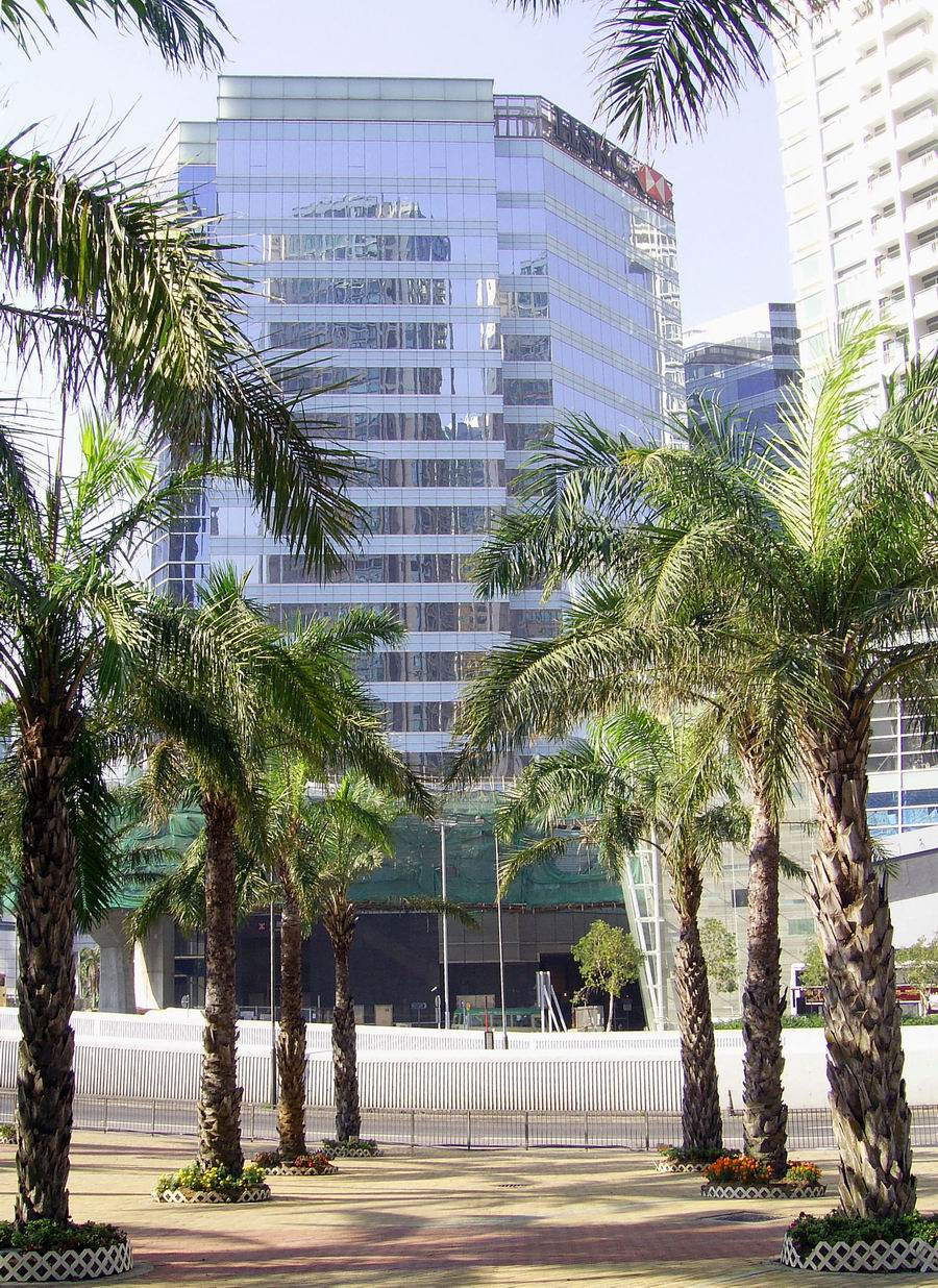 中文（香港）: 滙豐中心第一座